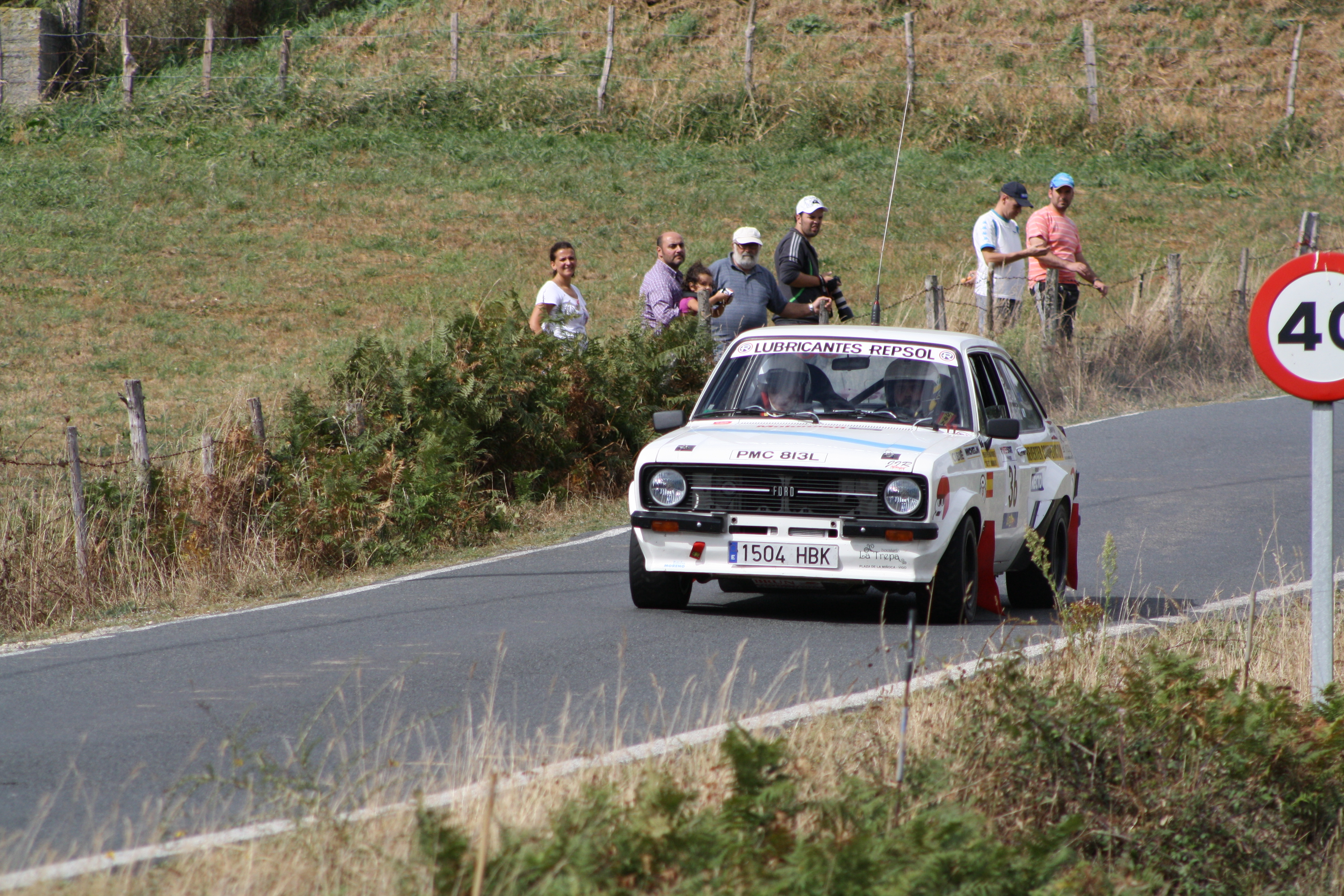 Ford Escort que perteneció a Beny Fernandez. Este modelo ganó el Rally de Ourense de 1977 (25-26 junio, puntuable para el Campeonato de España de 1977) con Beny como piloto y A. Doural como copiloto. Segundo fue Marc Etchebers y tercero R. Cid.